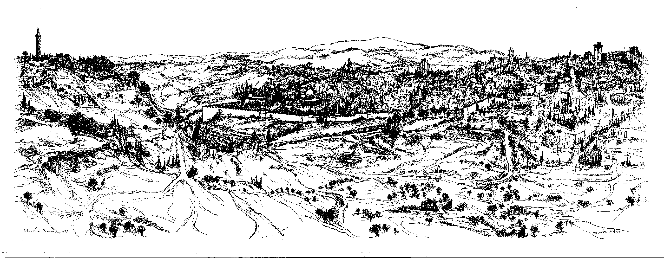 אסתר לוריא הייתה ציירת עטורת פרסים ומעצבת במה ותפאורה. זכתה פעמיים בפרס דיזנגוף. רישום פנורמי של ירושלים